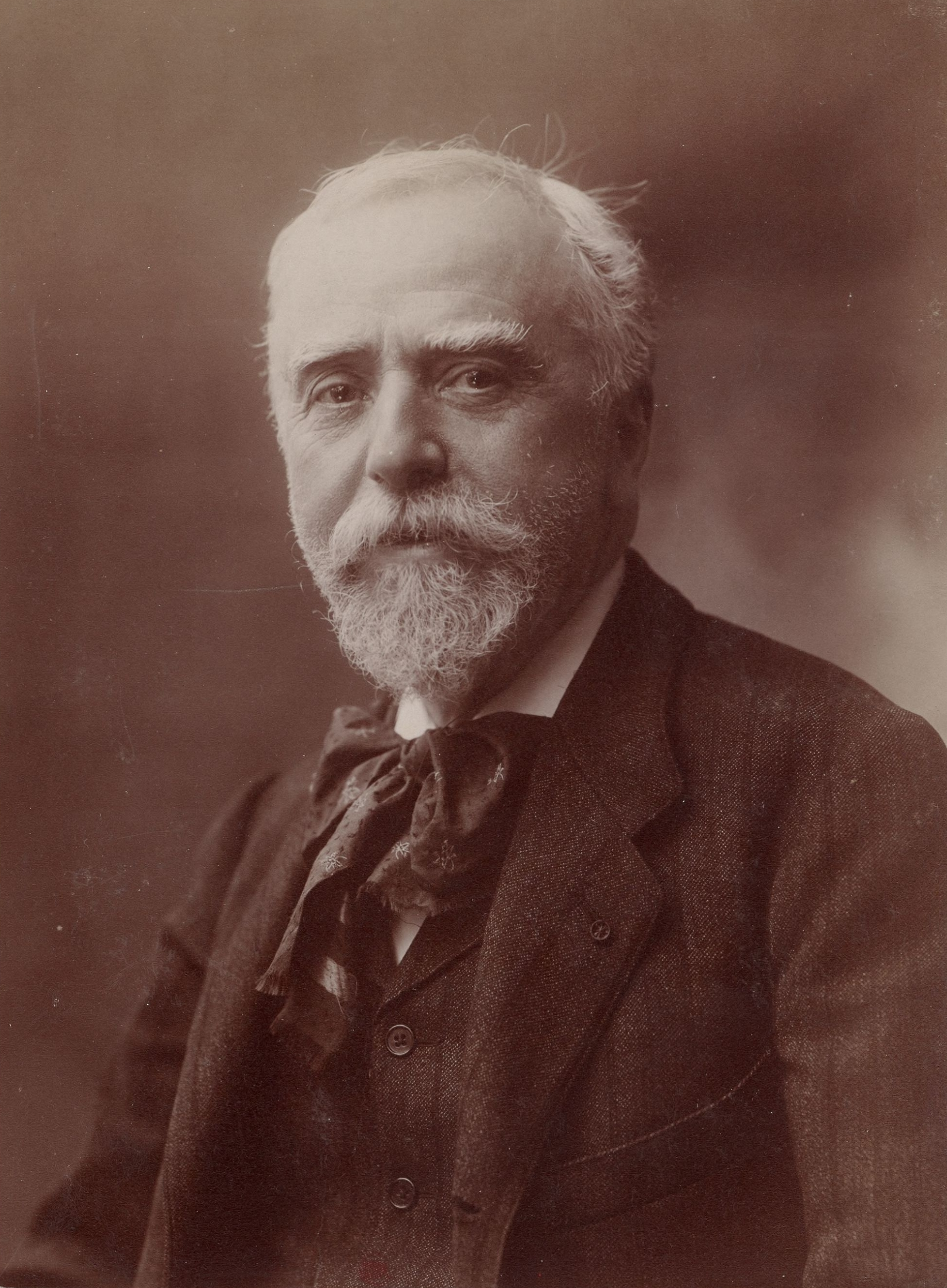 M. Léon Lhermitte. Peintre.